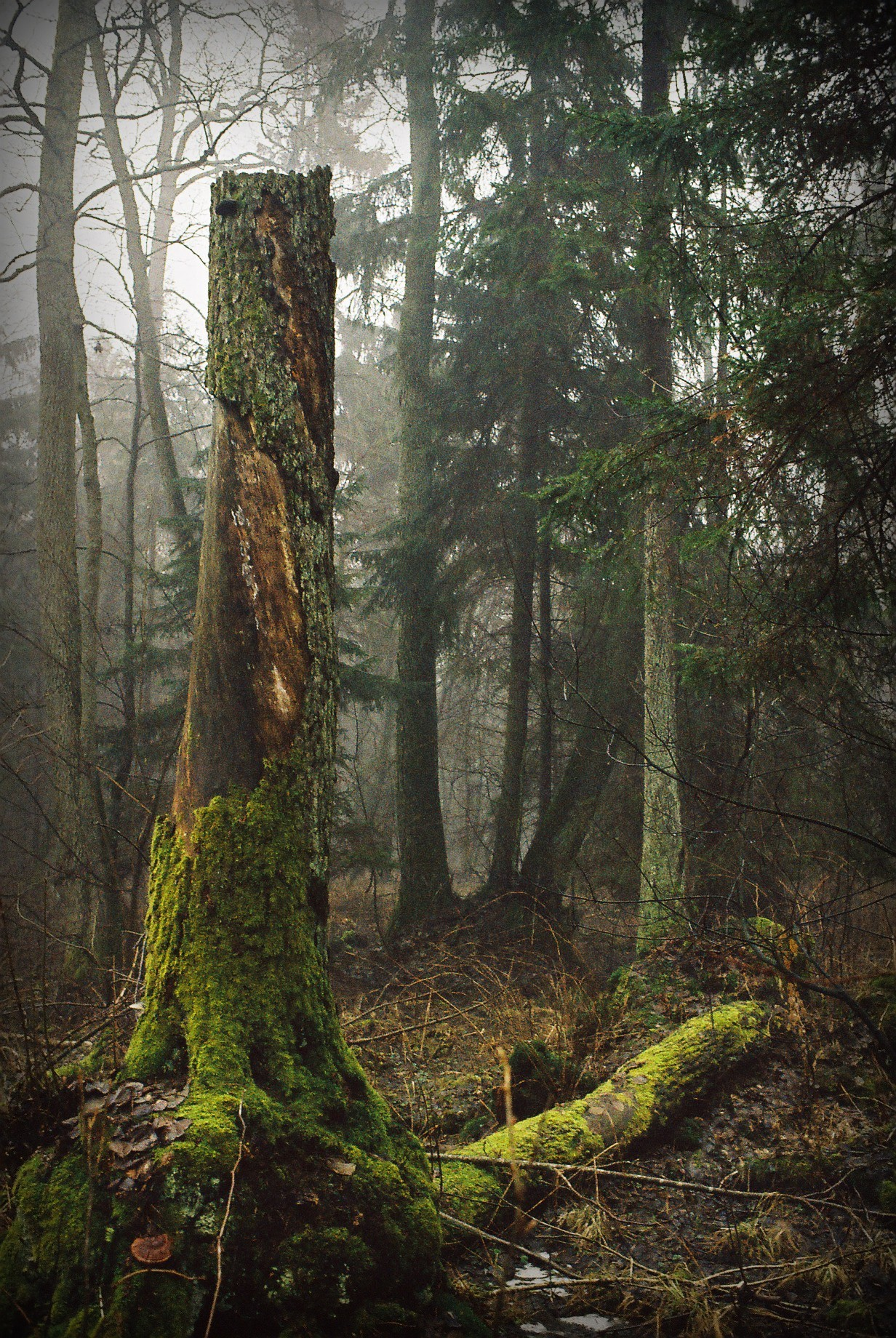 Autor: Adrian Grzegorz Rak utworzenia: 2005